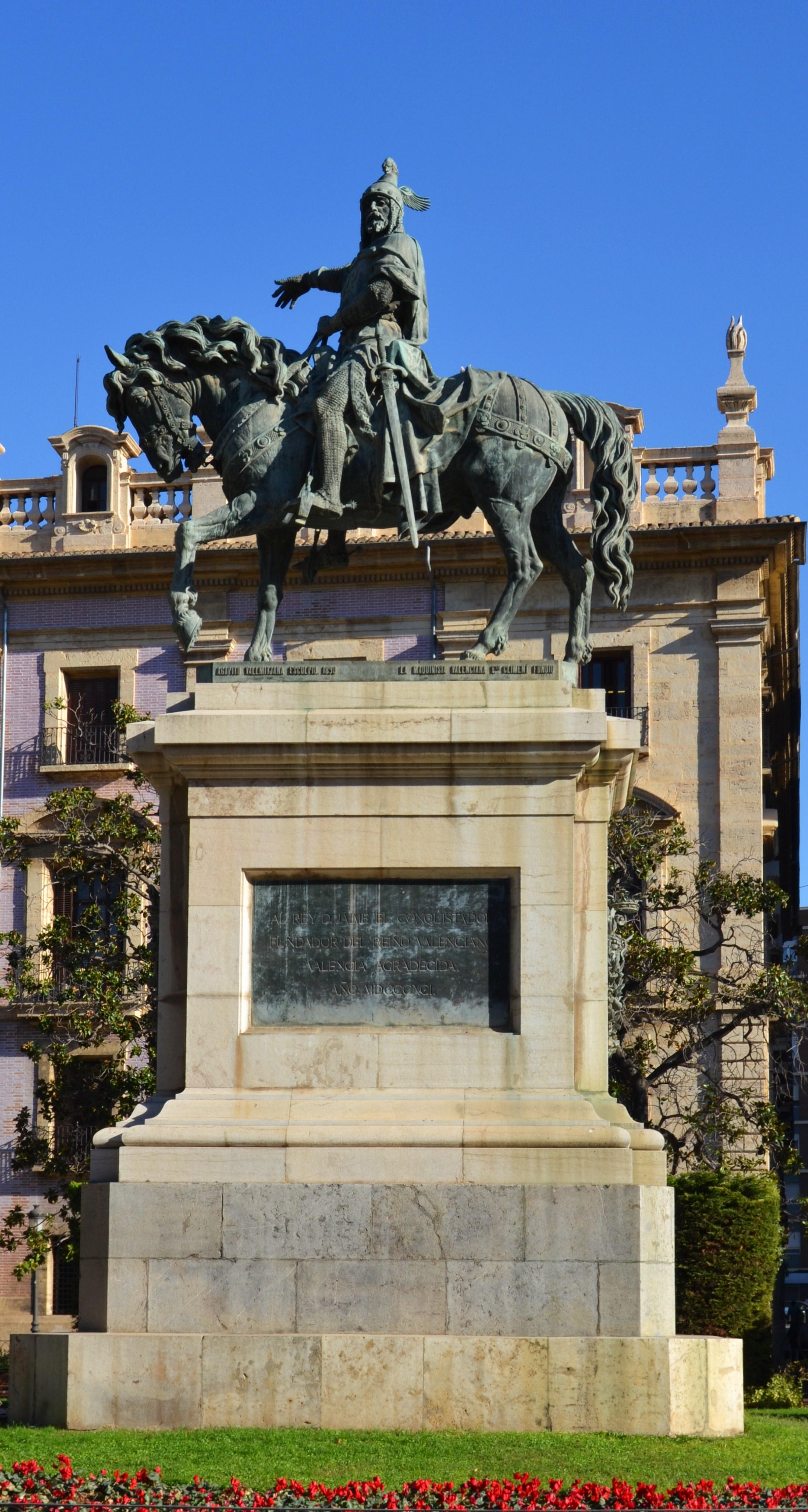 Estàtua eqüestre de Jaume I, València.